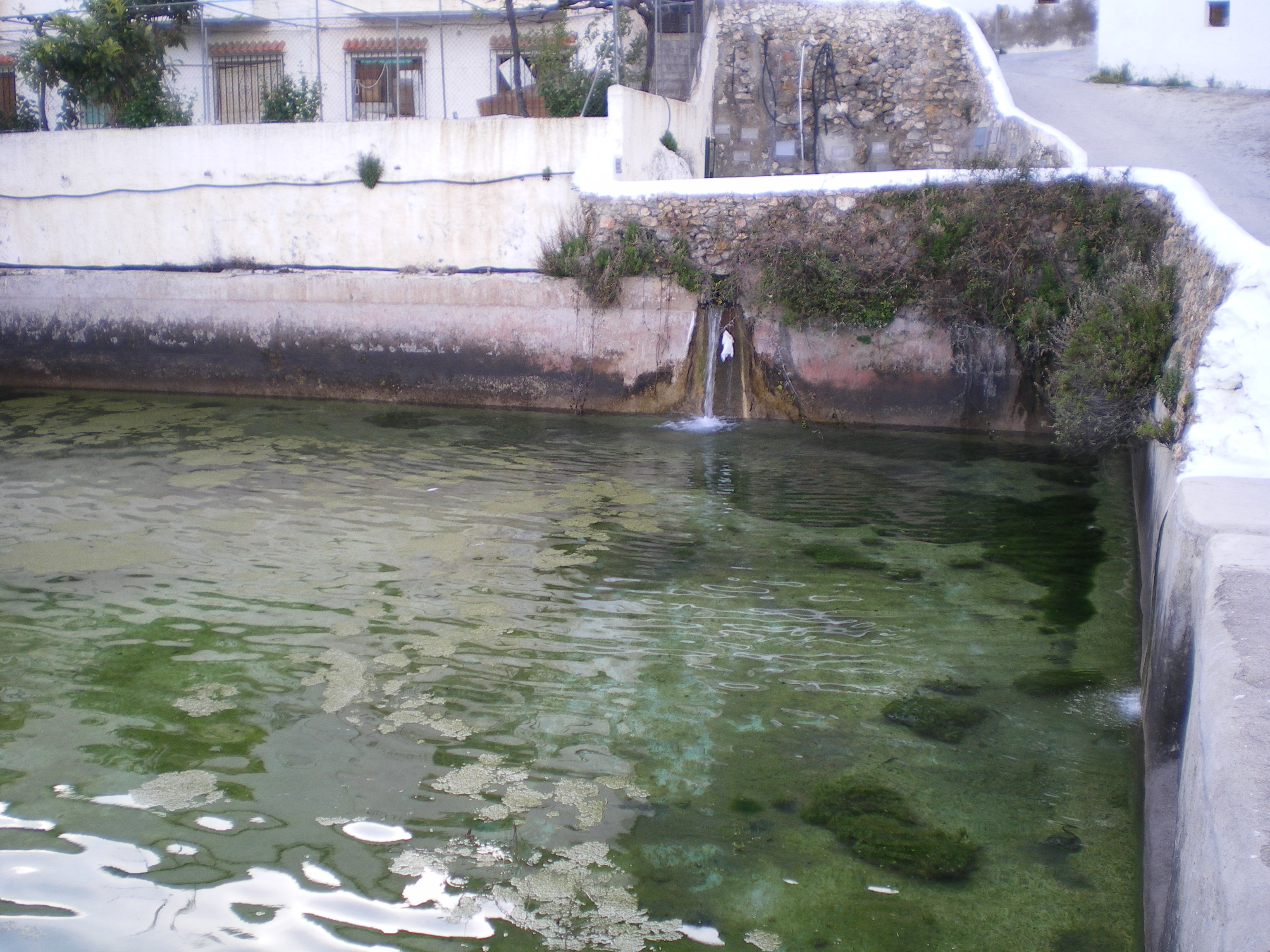 Fotografía de La Zanja, manantial y balsa en la localidad de Huebro, municipio de Níjar, provincia de Almería, España.